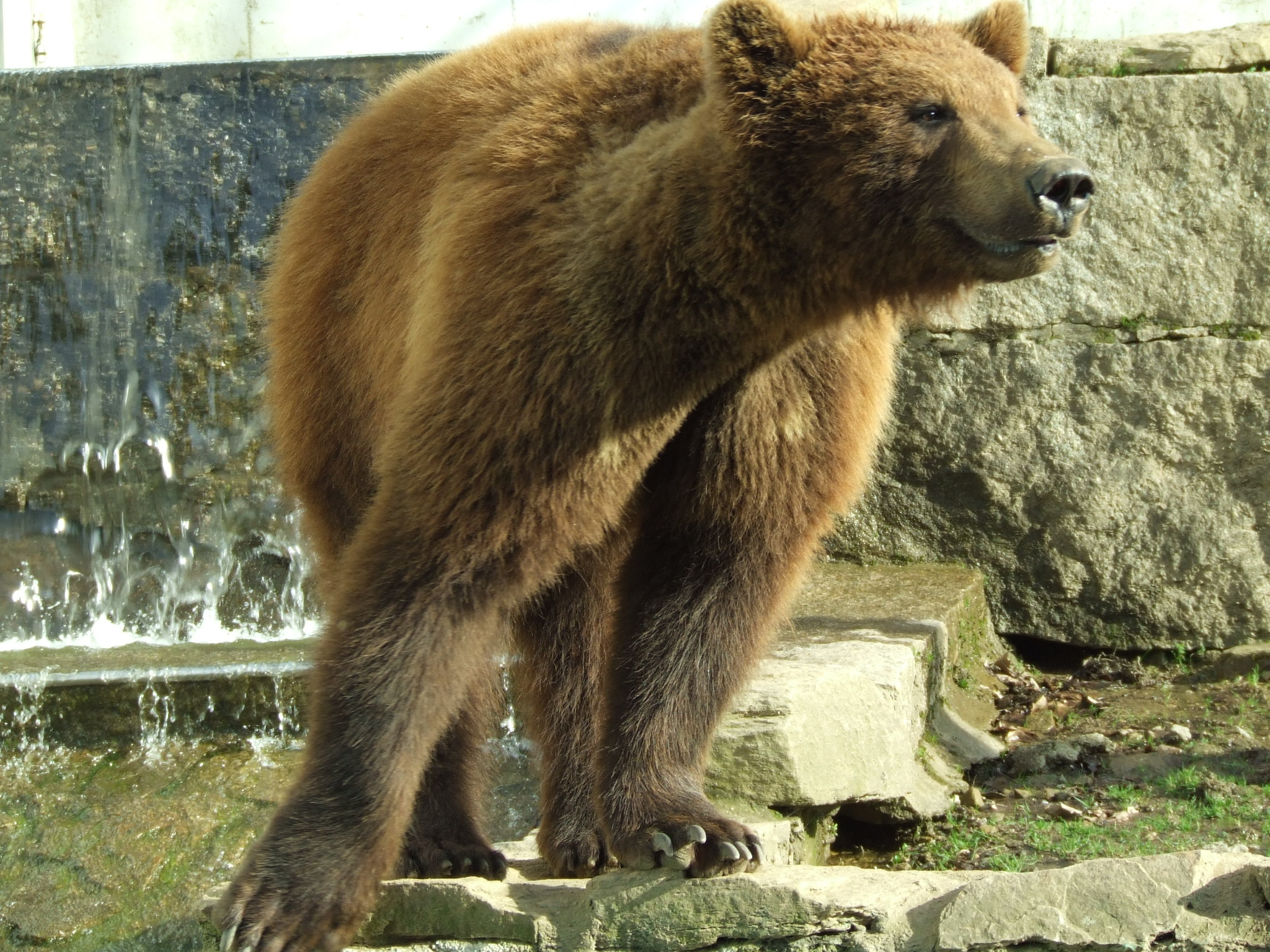 Oso no zoolóxico de Vigo.